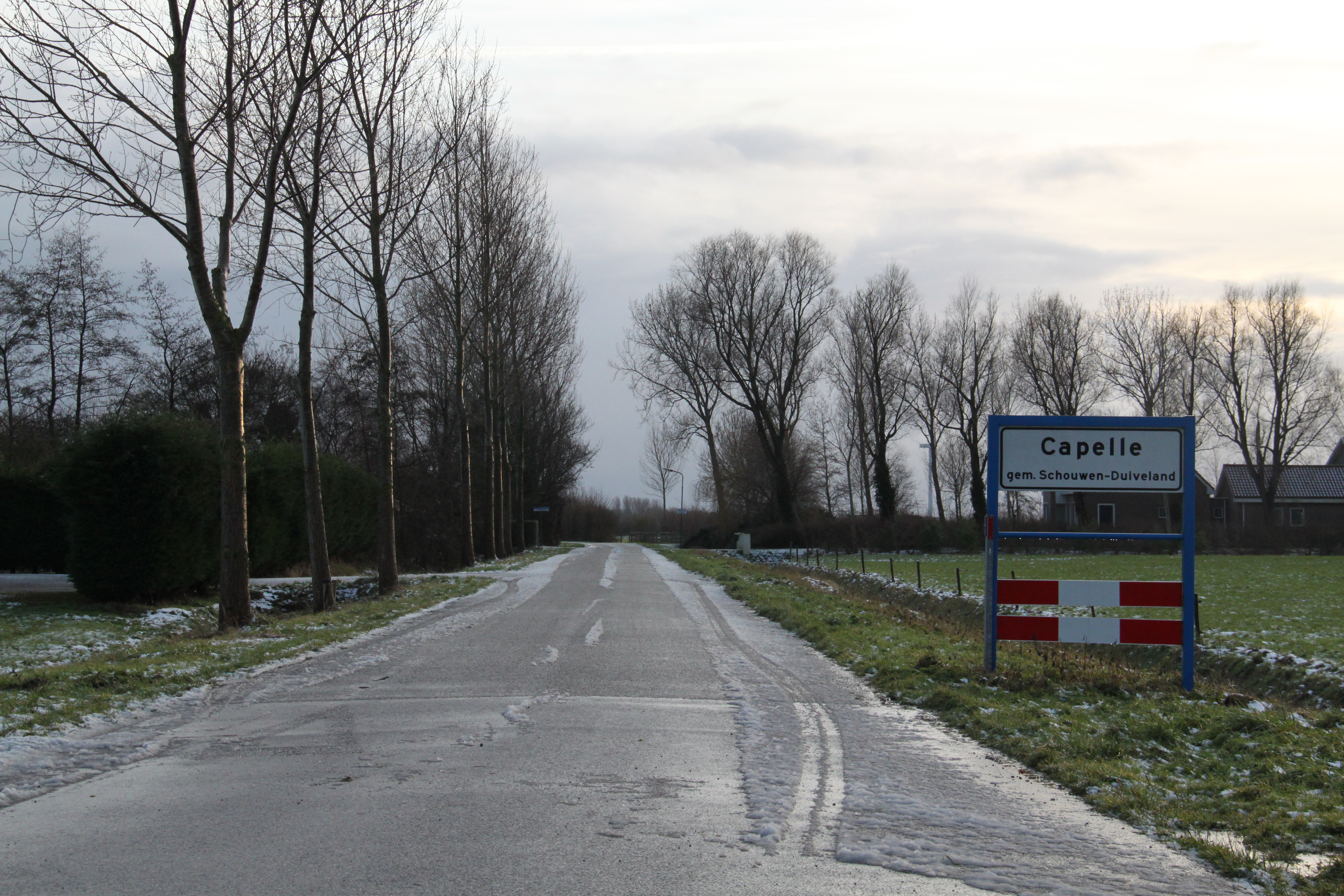 Zicht op Capelle met plaatsnaambord.